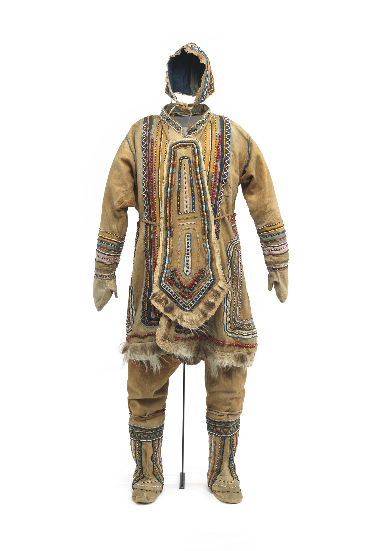 Hætte, frakke, forklæde, bukser, støvler og vanter i brunfarvet, afhåret rensdyrskind. Dekoreret med perler, og gult, blåt, gråt og sort stof. Frakke i symmetrisk snit med bindebånd af afhåret skind. Frakken er forneden kantet med hundeskind. Fra Det kejserlige Videnskabernes Akademi i Wien 1862. Hood, coat, apron, trousers, boots and mittens in brown-dyed depilated reindeer skin. Decorated with beads and yellow, blue, grey and black cloth. Coat in symmetrical cut with tie-strings of depilated skin. The coat is trimmed below with dog skin. From the Imperial Academy of Sciences, Vienna, 1862. Foto: Roberto Fortuna